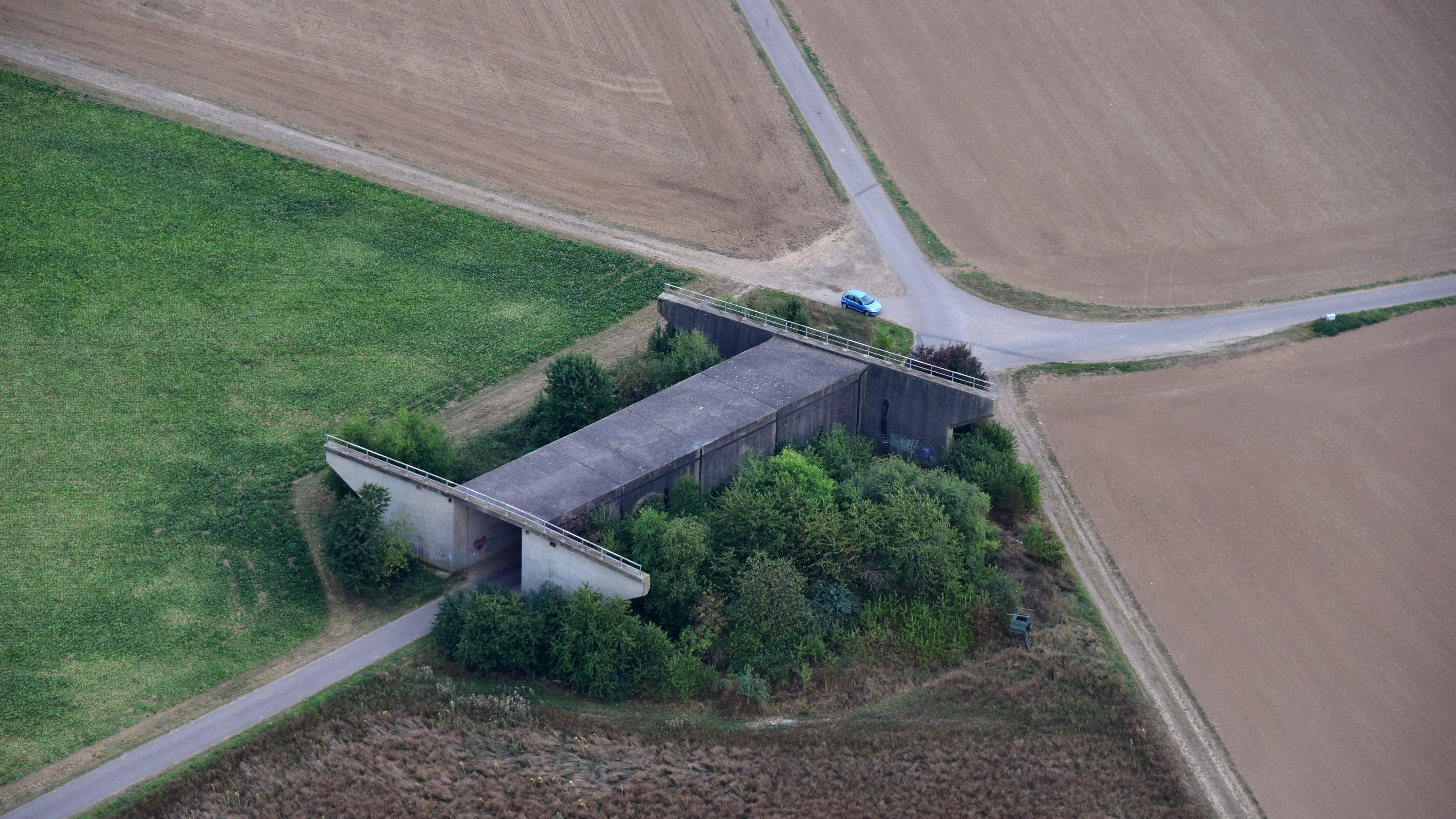 Investitionsruine (So-da-Brücke, geplante A56) in Euskirchen-Elsig, SÖ von Frauenberg, Luftaufnahme (2016)